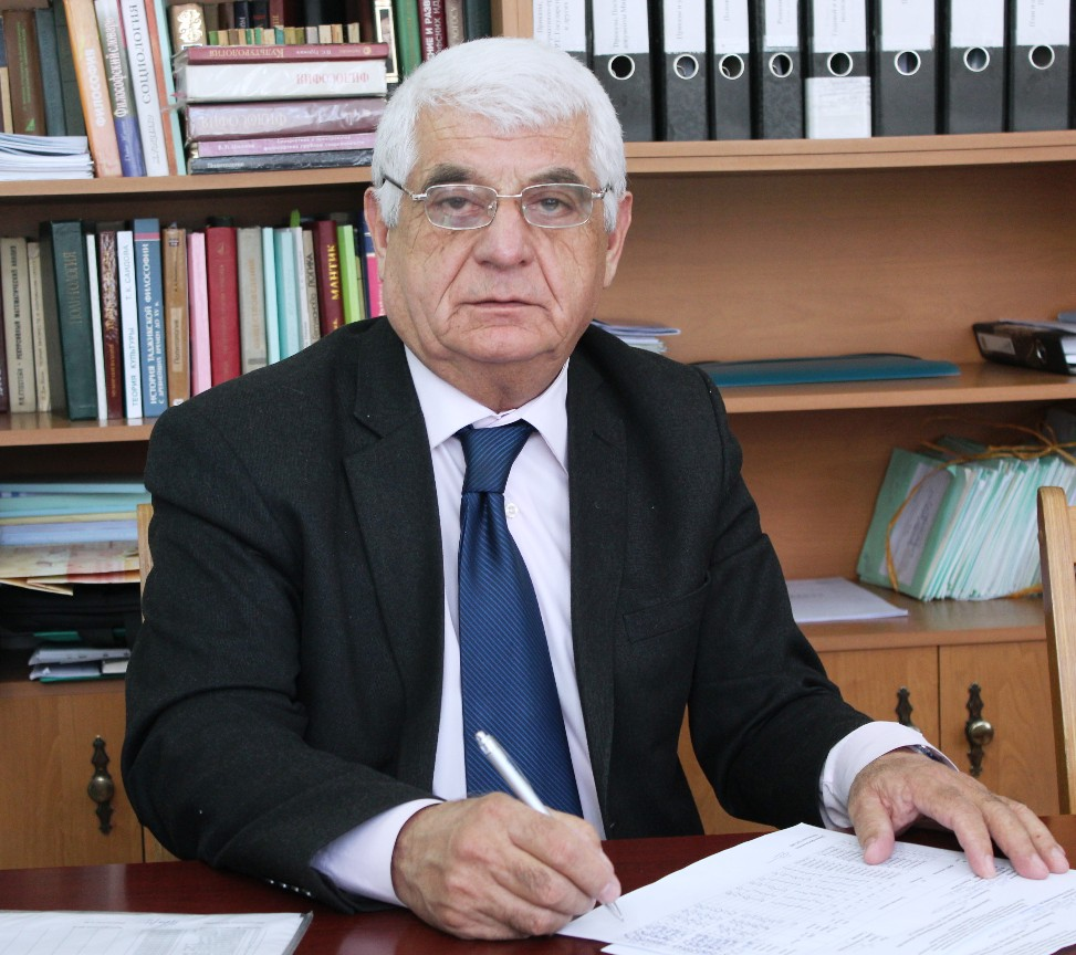 Самиев Абдусамад Хасанович, доктор философских наук, профессор РТСУТоҷикӣ: Самиев Абдусамад Хасанович, доктори илмҳои фалсафа, профессори ДСРТ